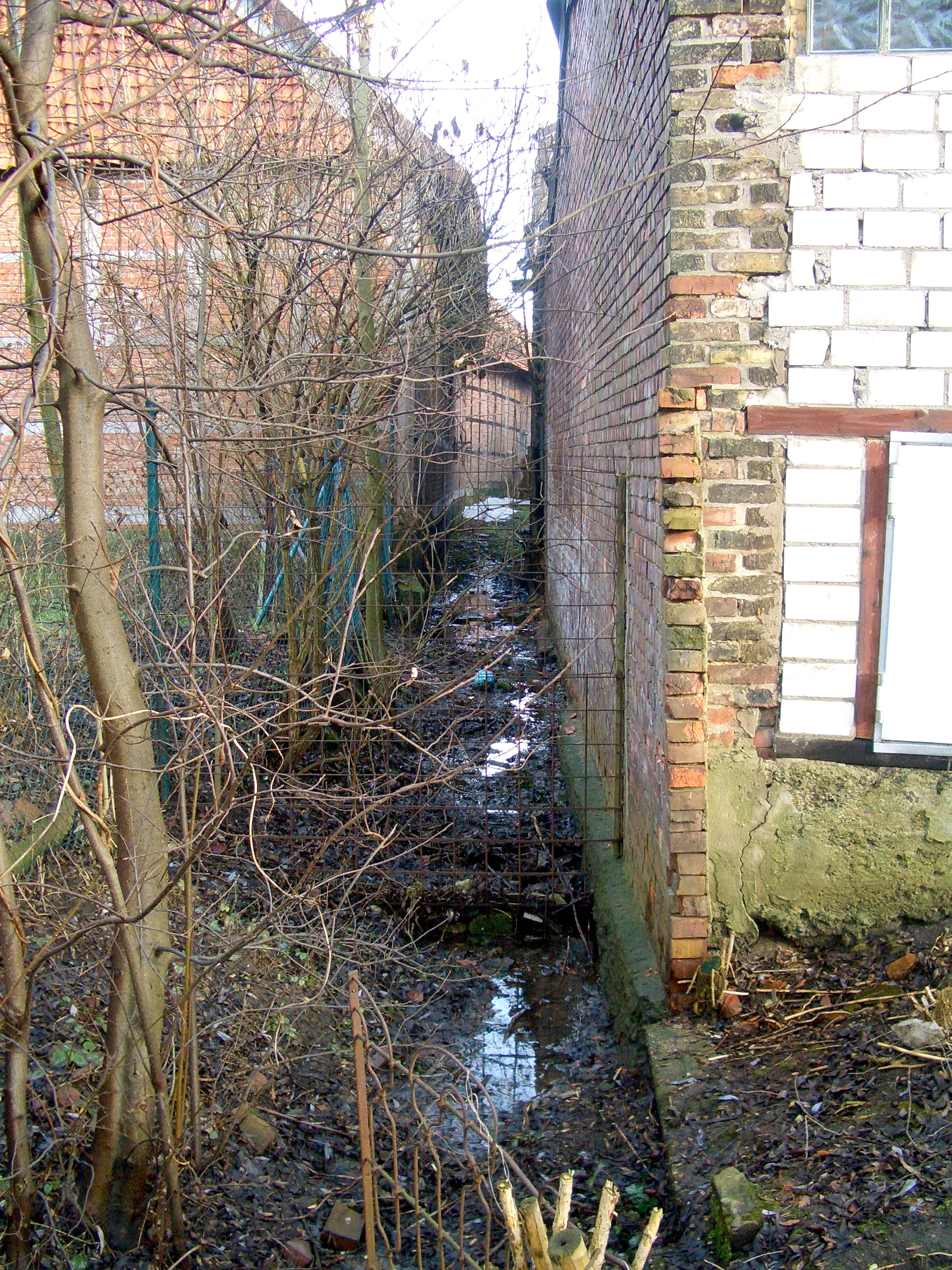 Wassergasse in Stöckheim, Blickrichtung von der Oker nach Osten.